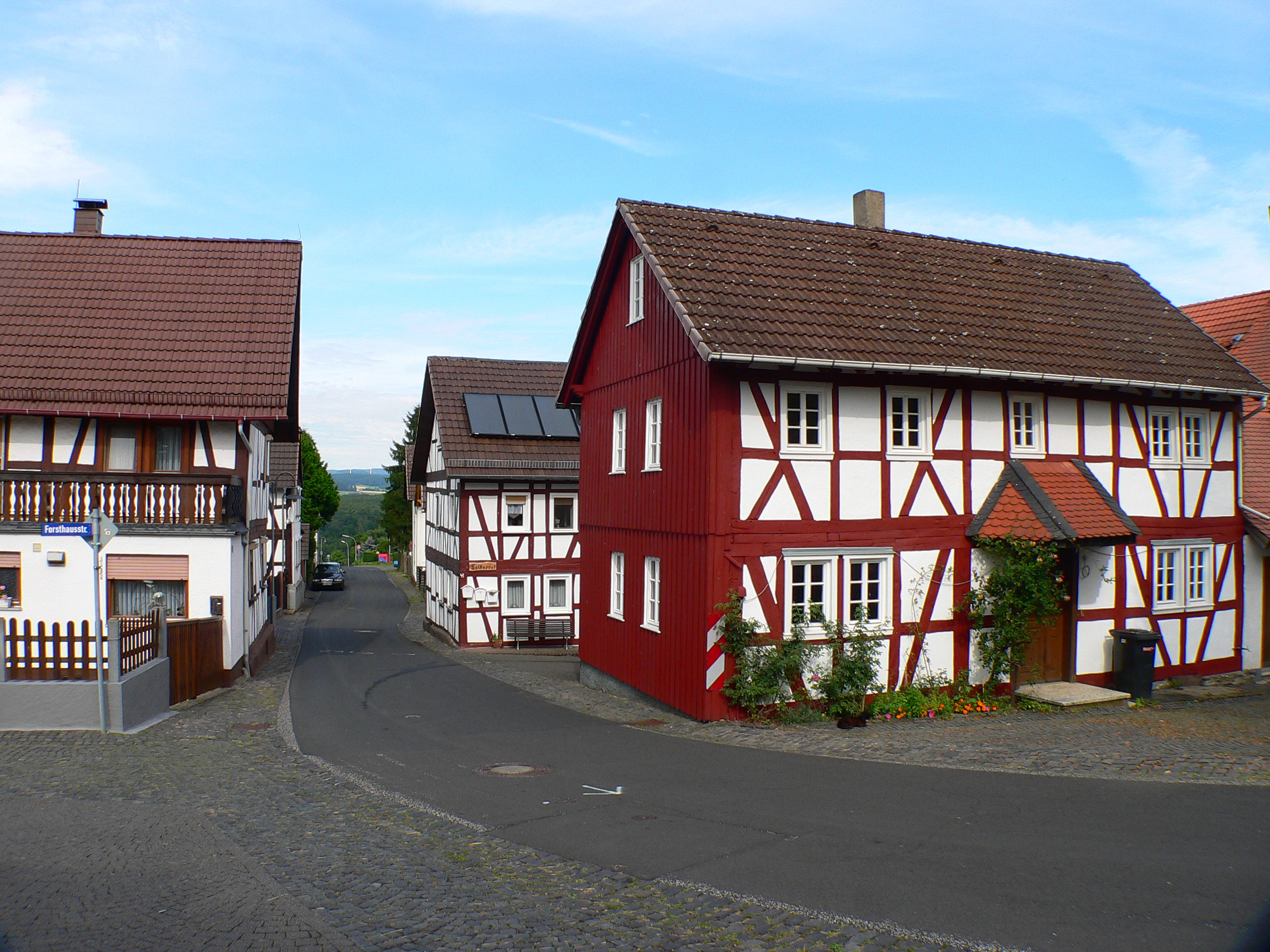 Ortsdurchfahrt (Kreisstraße 192) von Stornfels, Stadtteil der Stadt Nidda in Hessen, Deutschland